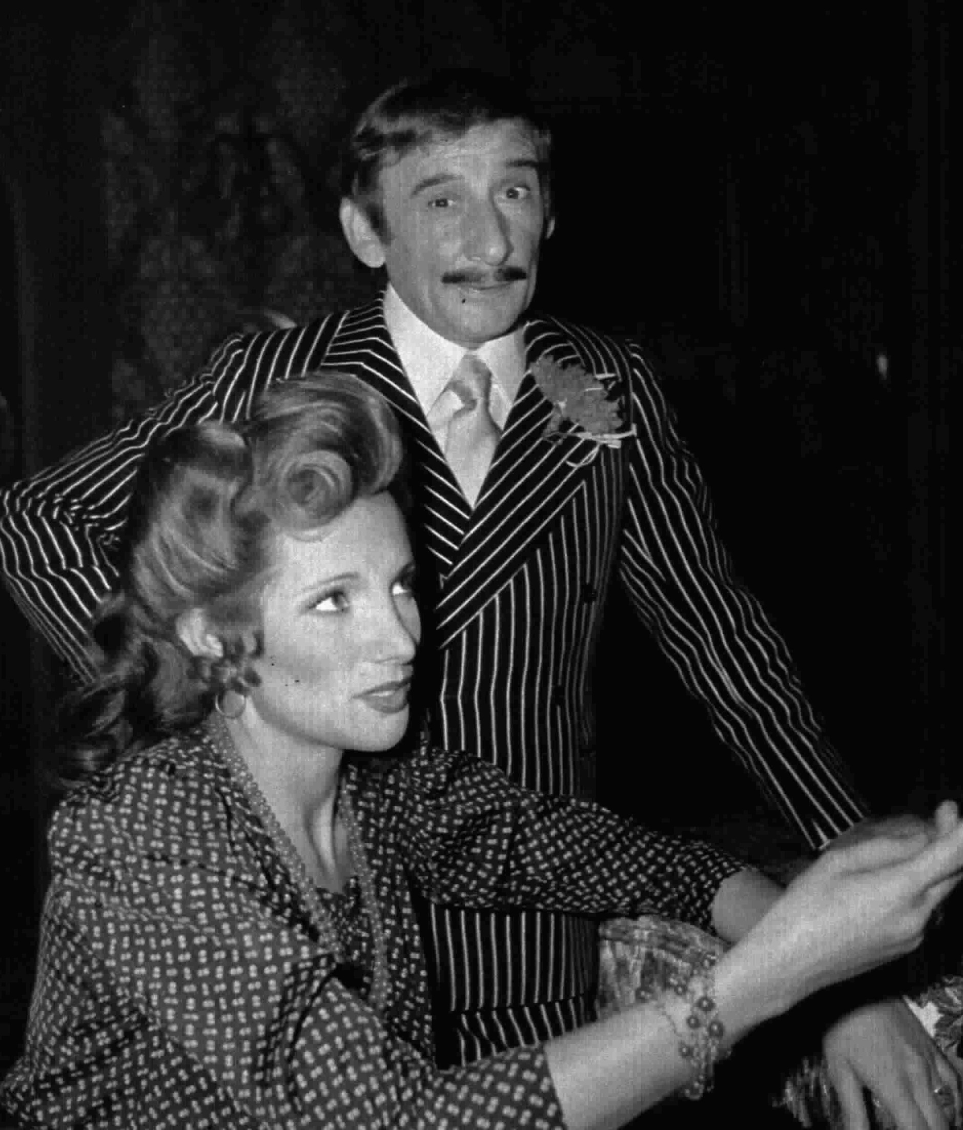 Italian actors Giuditta Saltarini and Renato Rascel